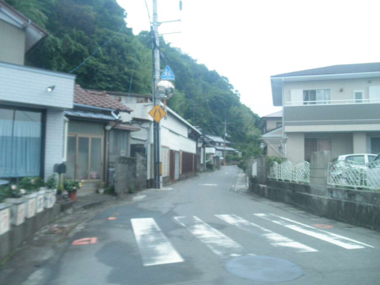 徳島県小松島市立江町江ノ上